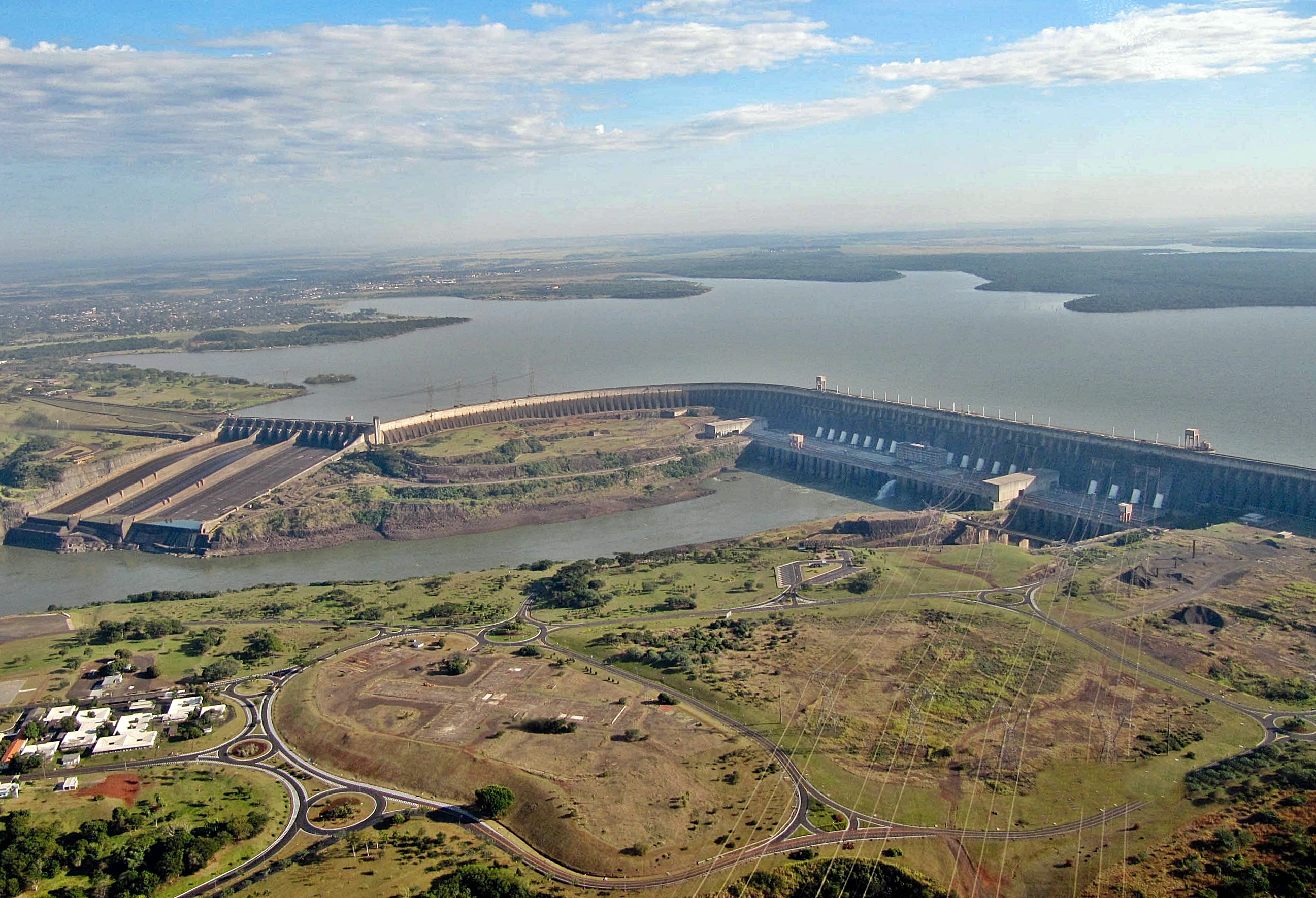 Vista aérea da Usina Hidroelétrica de Itaipu, Brasil.